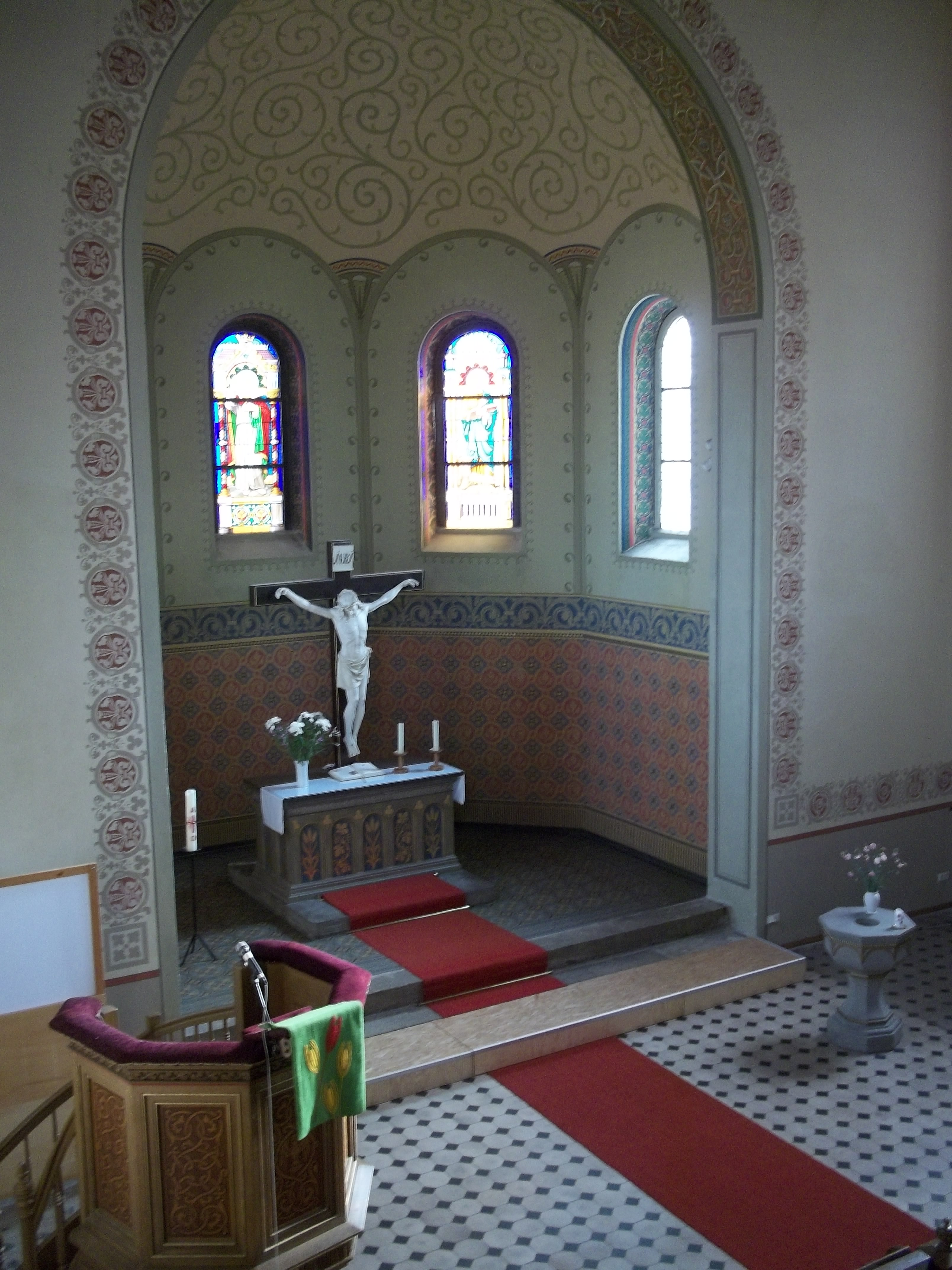 Kirche Leopoldshall: Blick von der Seiten-Empore auf Kanzel und Altar